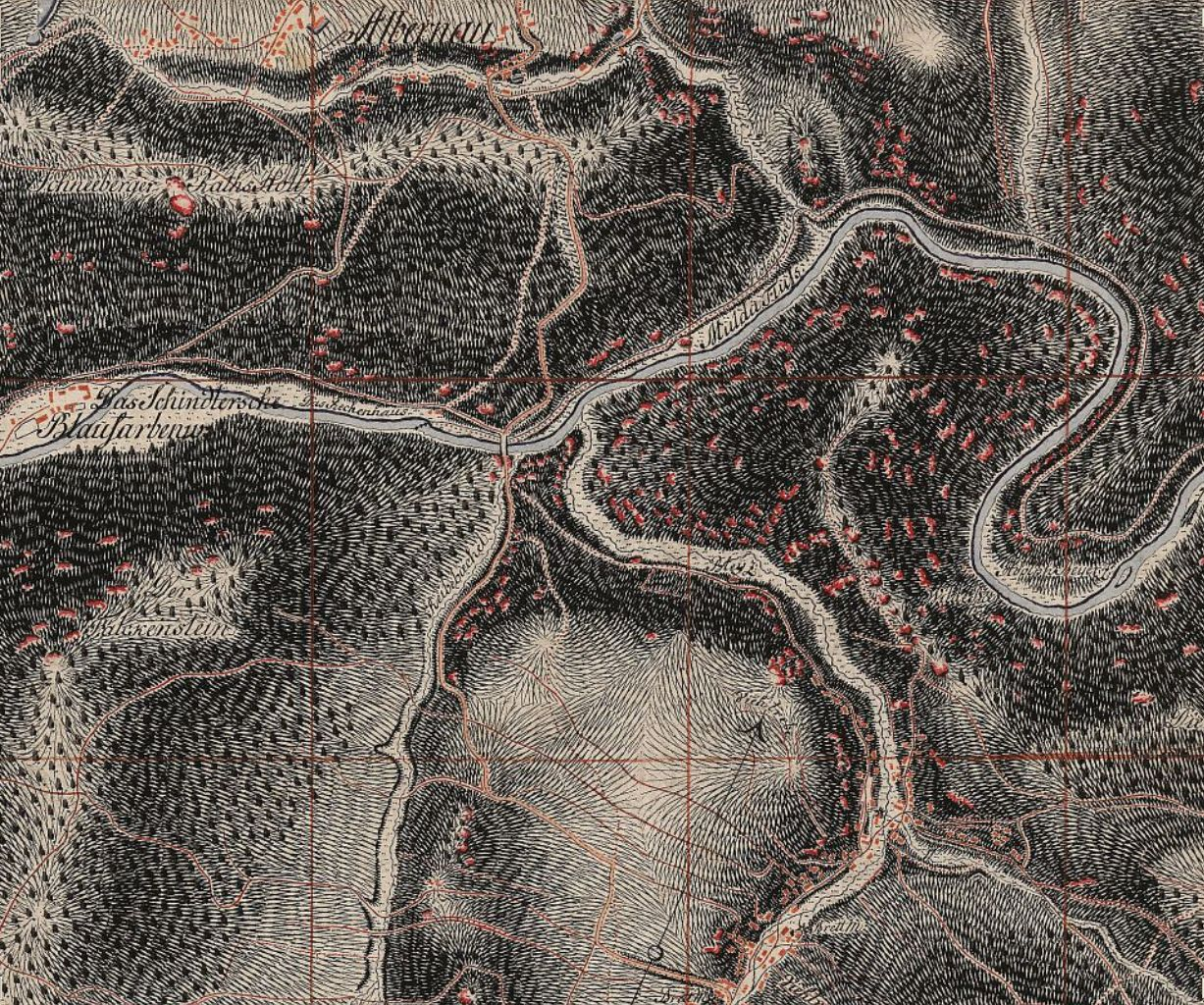 Westerzgebirge - Friedrich Ludwig Aster: Meilenblätter von Sachsen, Ausschnitt aus Blatt 222 des Berliner Exemplars – Bockau, Sosa, Blauenthal, Albernau -, aus dem Jahr 1791. Link zur Landkarte in der Staats- und Universitätsbibliothek Dresden In dieser Landkarte ist Nordwesten oben. Unterer Teil von Bockau, Schindlersches Blaufarbenwerk und Albernau an der Zwickauer Mulde